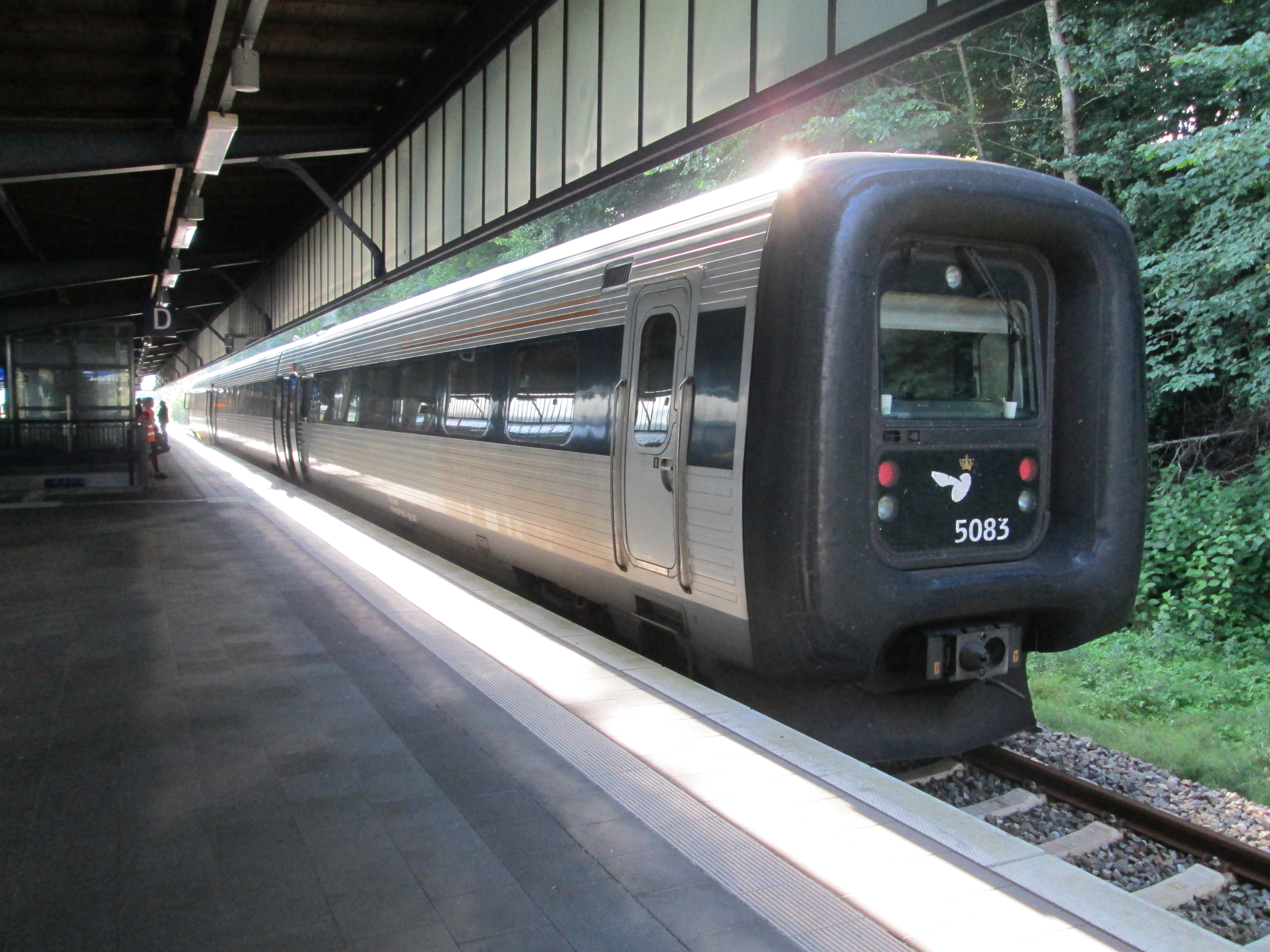 Flensborg station